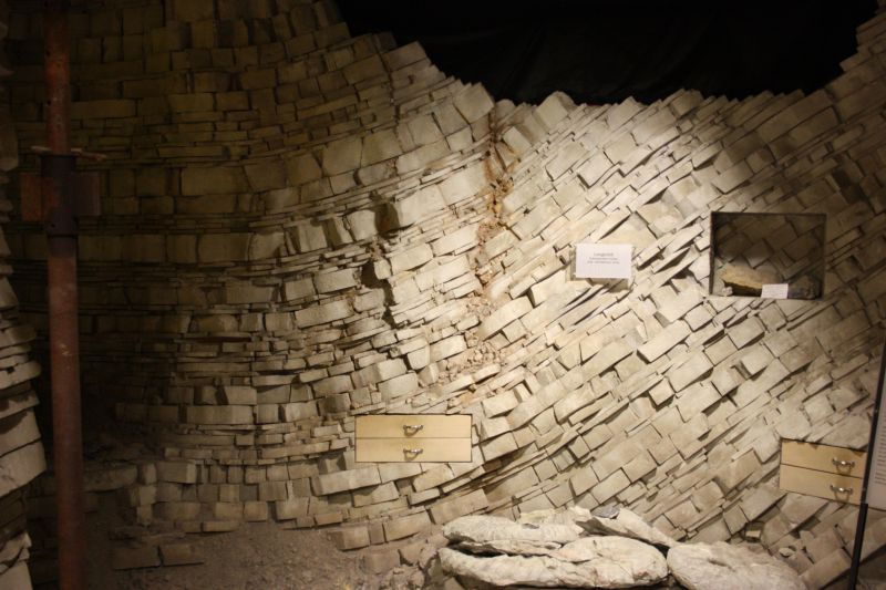 Ein Teil der Daueraustellung "Terra.vision" des Museums am Schölerberg Osnabrück.